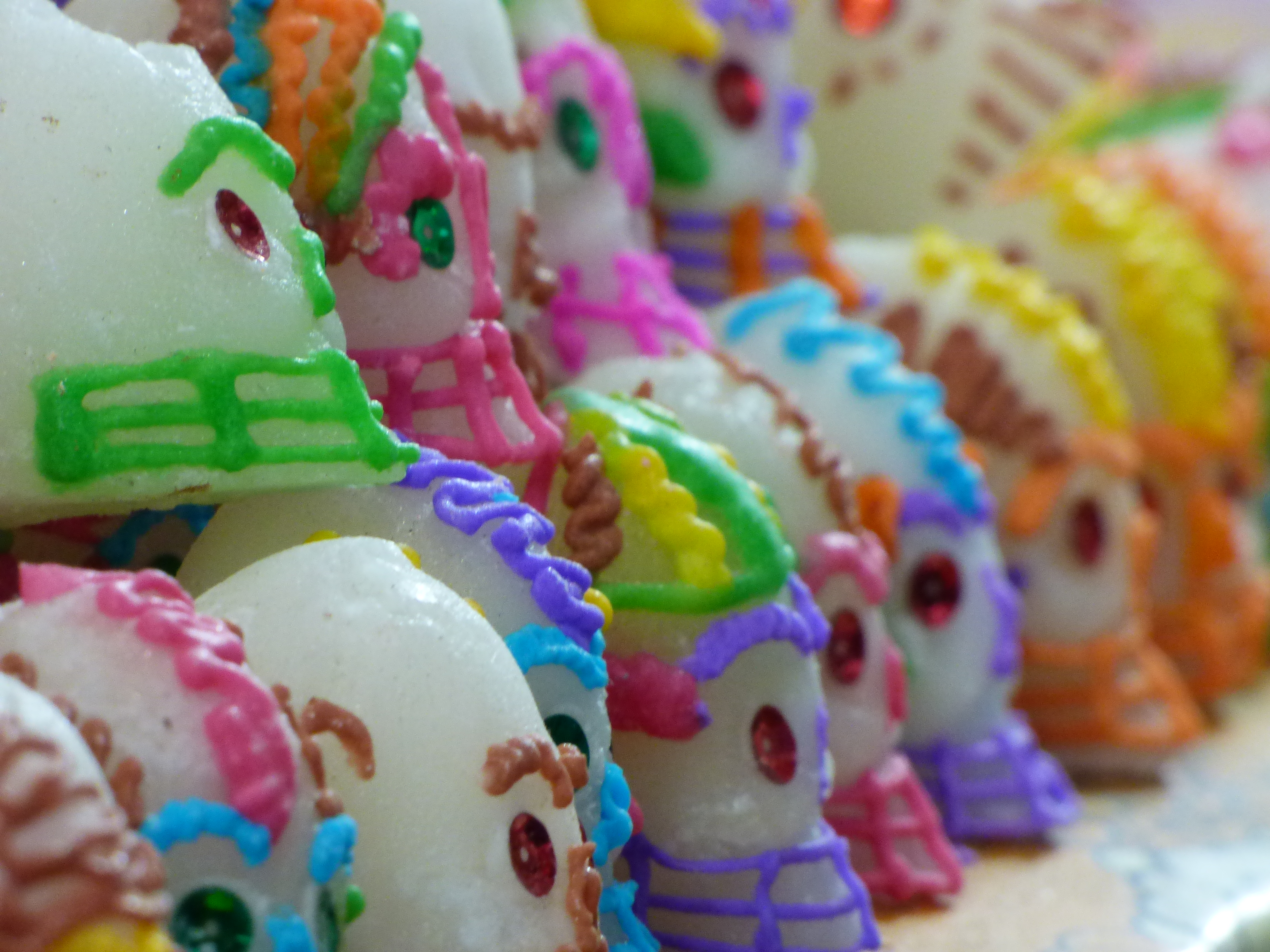 Festival de las Calaveras, Aguascalientes 2014